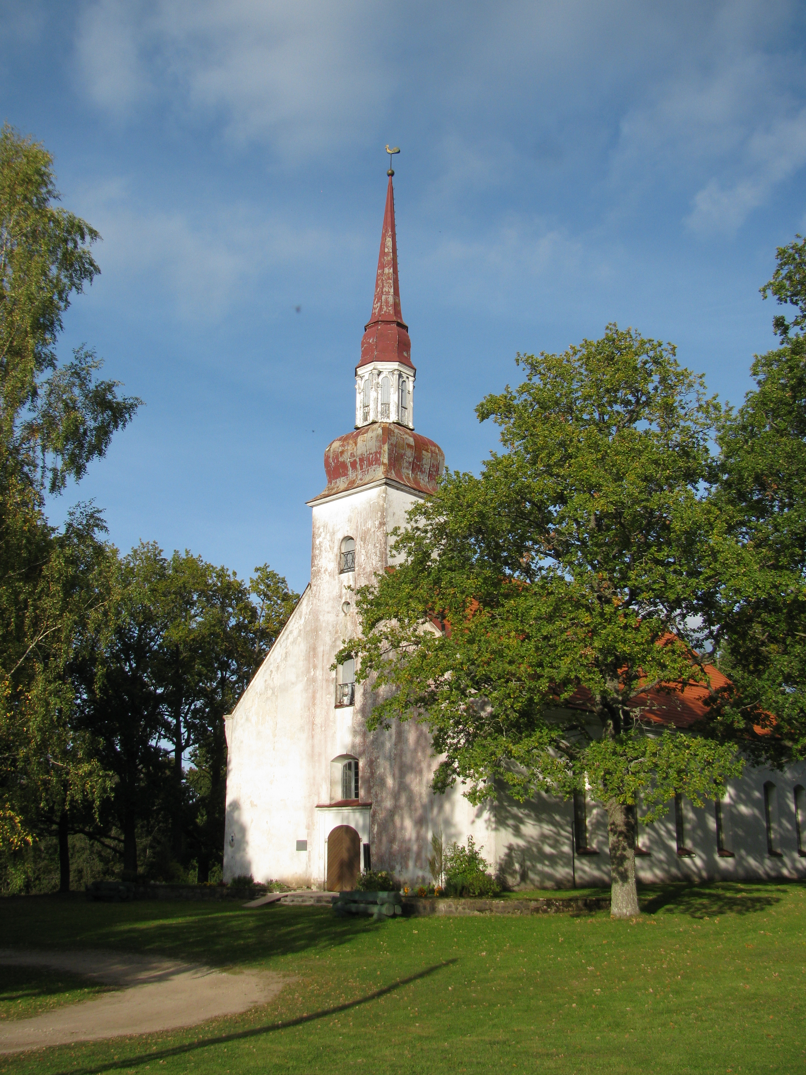 Apekalna (Opekalna) luterāņu baznīca, Jaunlaicenes pagasts